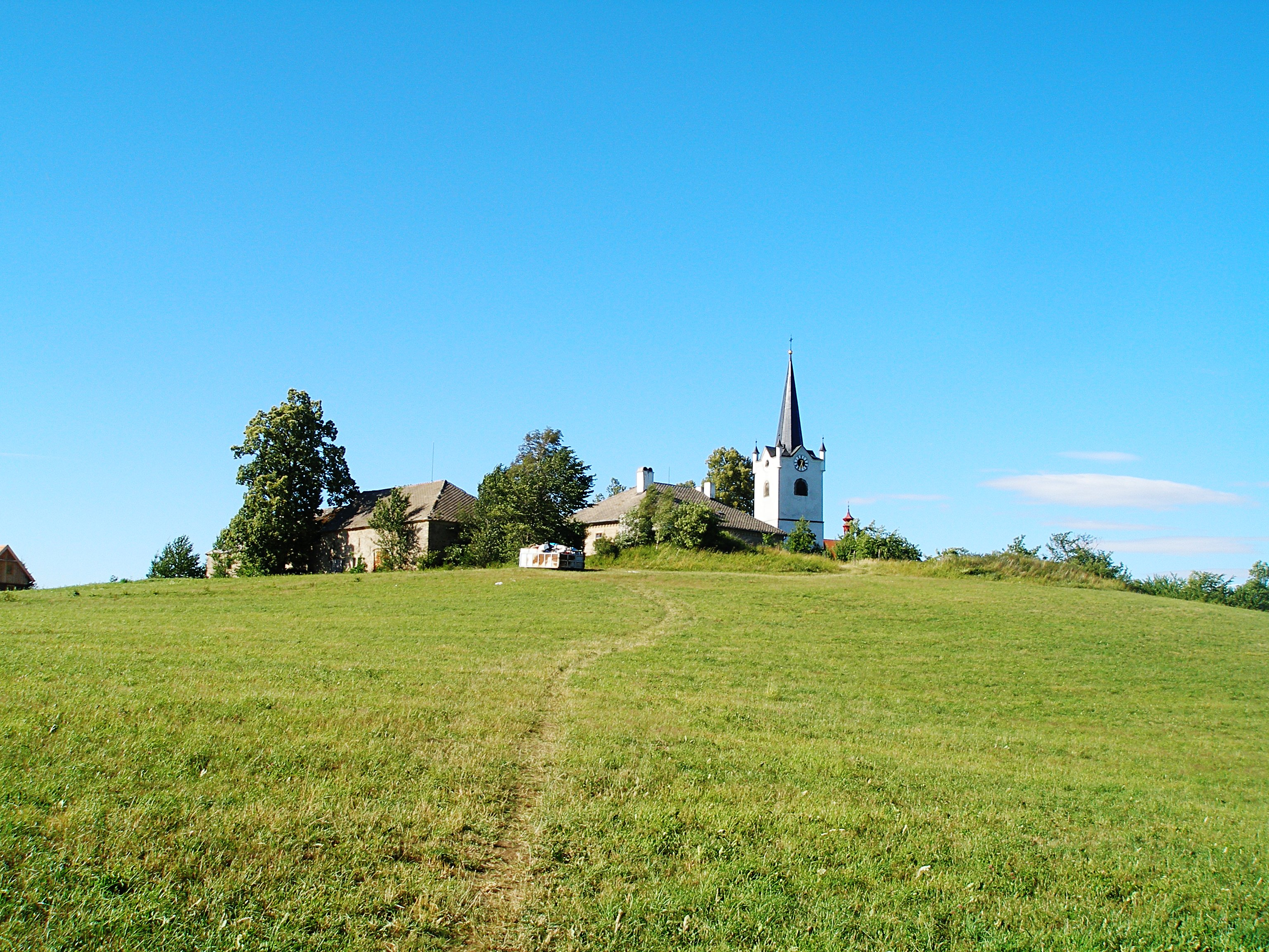 Malšín - areál kostela Srdce Ježíšova a fary od Thurmbergu